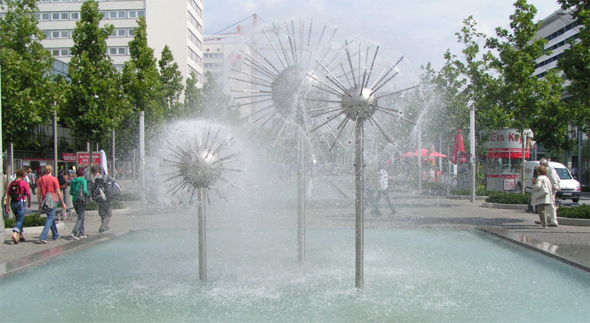 Pusteblumenbrunnen von Leonie Wirth auf der Prager Straße in Dresden